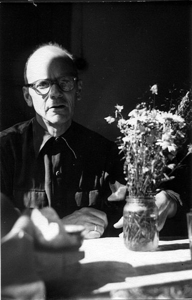 Финский писатель и переводчик Тито Коллиандер